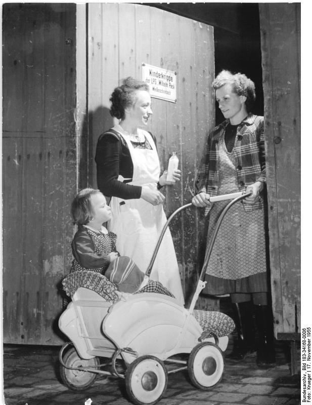 LPG Weißenschirmbach, Kinderkrippe, Verabschiedung Zentralbild Krueger 17.11.1955 Zur Vorbereitung der IV. LPG-Konferenz vom 9. bis 11.12.1955 LPG "Wilhelm Pieck" Weißenschirmbach, Krs. Querfurt Die LPG "Wilhelm Piek" in Weißenschirmbach hat durch die Anwendung fortschrittlicher Arbeitsmethoden und der modernen Technik, durch gute Arbeitsorganisation große Erfolge erreicht. 207 (zwei null sieben) Mitglieder bewirtschaften 730 (sieben drei null) ha Land. Bereits im Jahre 1954 war die LPG Millionär. Der Wert der Arbeitseinheit in dieser LPG beträgt 7, 60 (sieben Komma sechs null) DM sowie drei Kilo Getreide, drei Kilo Kartoffeln und 0, 30 (Null Komma drei null) Gramm Ölfrüchte. Zu Ehren des Wilhelm-Pieck-Aufgebotes verpflichtet sich die LPG, Im Jahre 1955 die Vorschußzahlungen an die Mitglieder ohne Inanspruchnahme von Staatskrediten zu erledigen. Das sind im Monat 38 (drei acht) bis 42.000 (vier zwei null null null) DM, die die LPG aus eigenem Guthaben bestreitet. Daneben konnten die Genossenschaftsbauern in diesem Jahr noch beträchtliche Anschaffungen machen. So wurden aus dem unteilbaren Fonds mit eigener aubrigade 185.000 (eins acht fünf null null null) DM verbaut. UBz: 46 (vier sechs) Kinder sind in guter Obhut in der Kinderkrippe der LPG. Das tägliche Mittagessen liefert die LPG unentgeltlich. Ausserdem gibt die LPG für die Kinder bis zu einem Jahr alle Wäsche und die Milch, die die Säuglinge täglich brauchen, ebenfalls umsonst. -Genossenschaftsbäuerin Ursula Pawlowski holt nach des Tages Arbeit ihren kleinen Klaus aus der Kinderkrippe ab. Die Leiterin der Kinderkrippe, Helga Remmlinger (links übergibt der Genossenschaftsbäuerin die Milch, die der kleine Klaus zum abend trinkt.